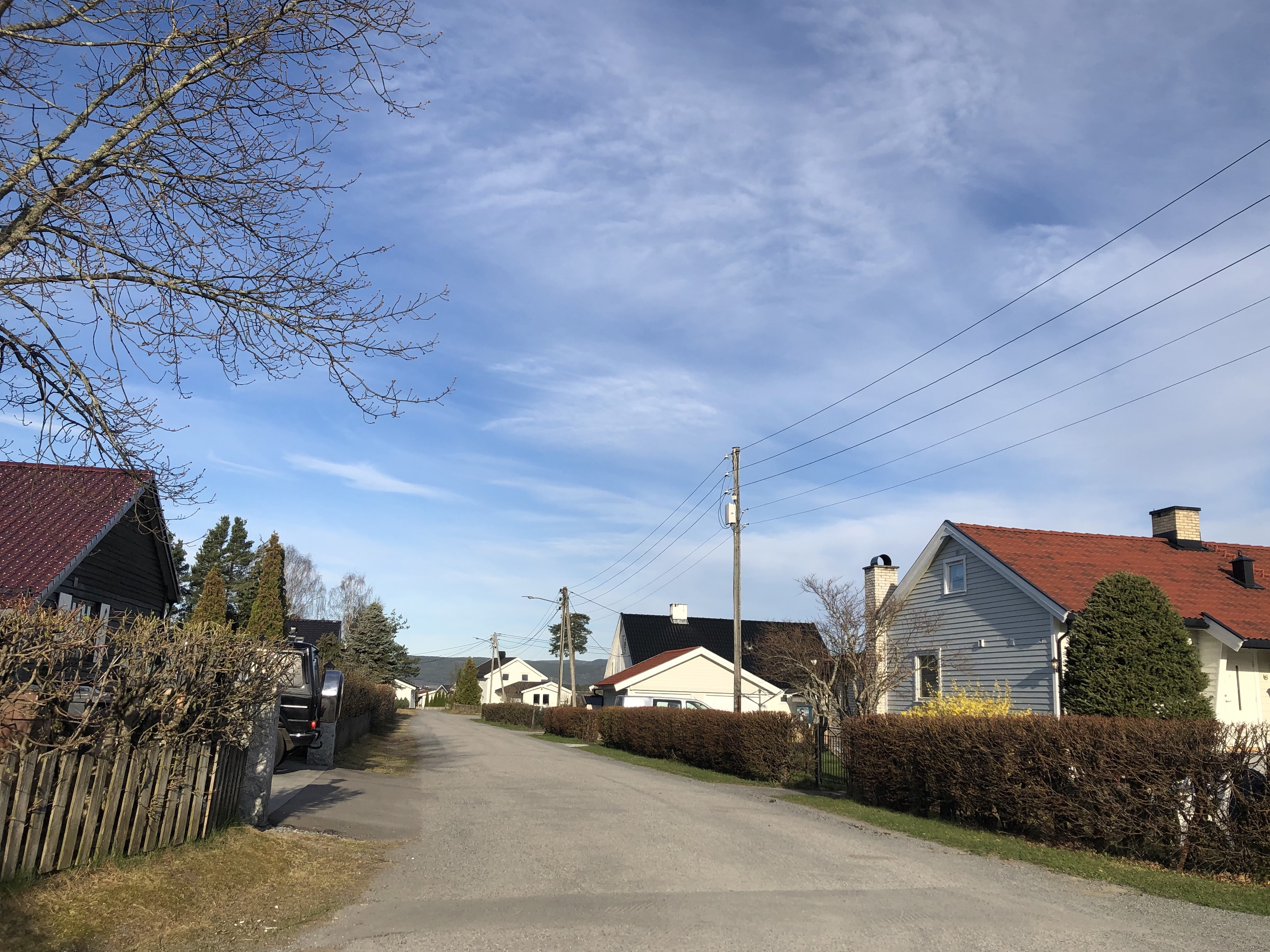 Slettveien, Ringerike